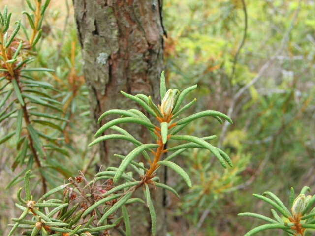 Rhododendron tomentosum